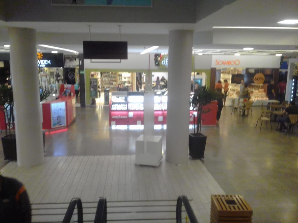 Palmas Shopping - corredor principal